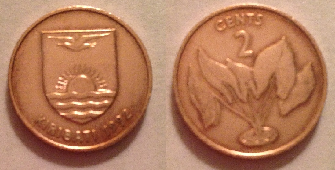 moneda de 2 centavos de Dólar de Kiribati de 1992